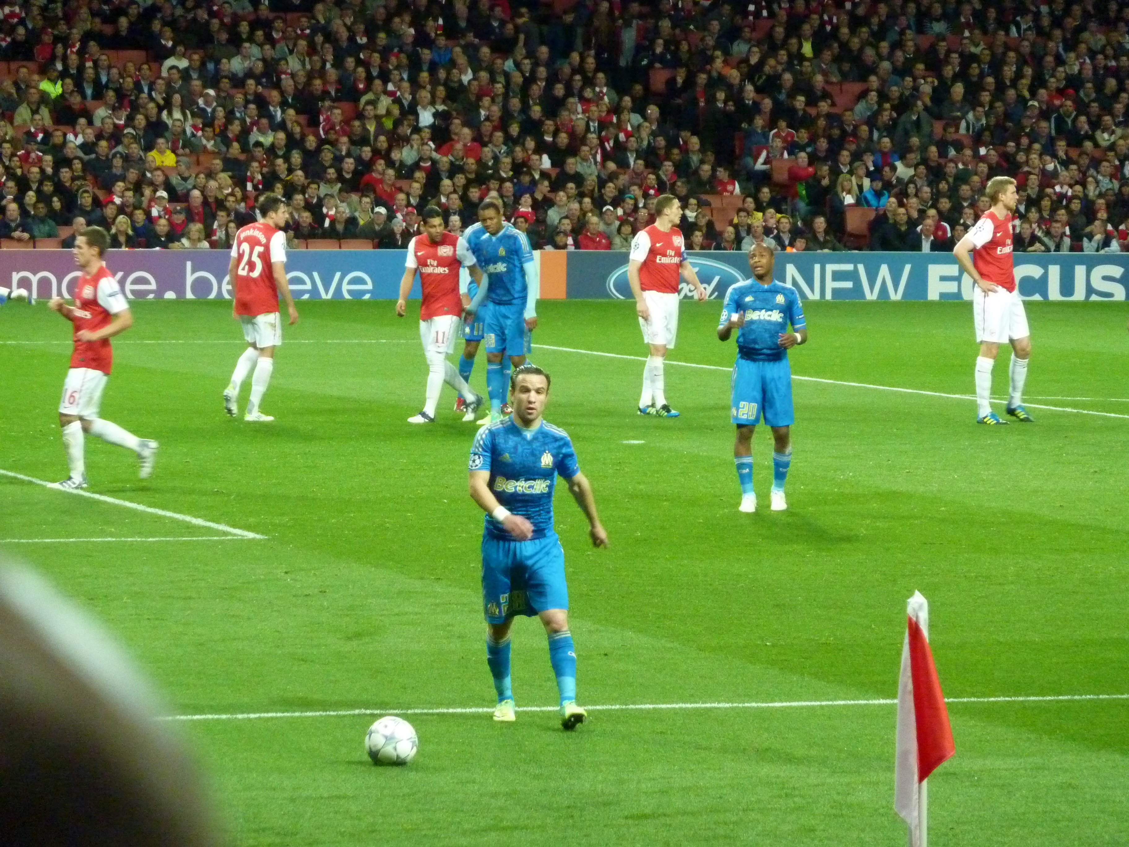 UEFA Champions League 2011/12 - Match Day 4: Arsenal FC v Olympique de Marseille - Emirates Stadium, London.